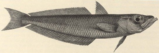 Pleuragramma antarcticum